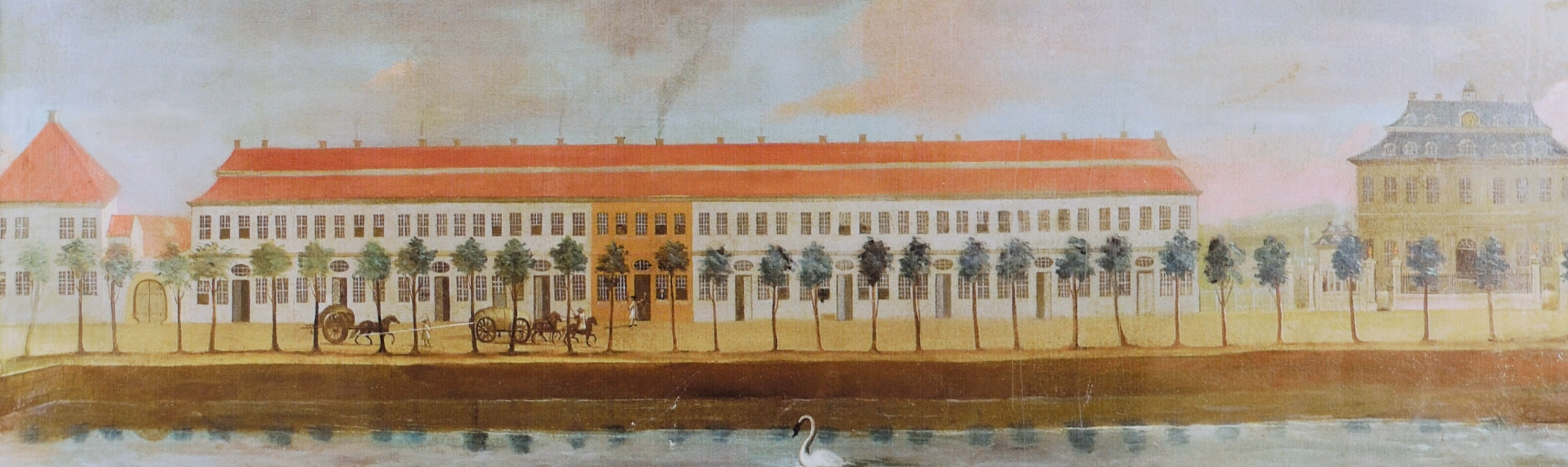 Detmolder Neustadt, Mitte 18. Jahrhundert